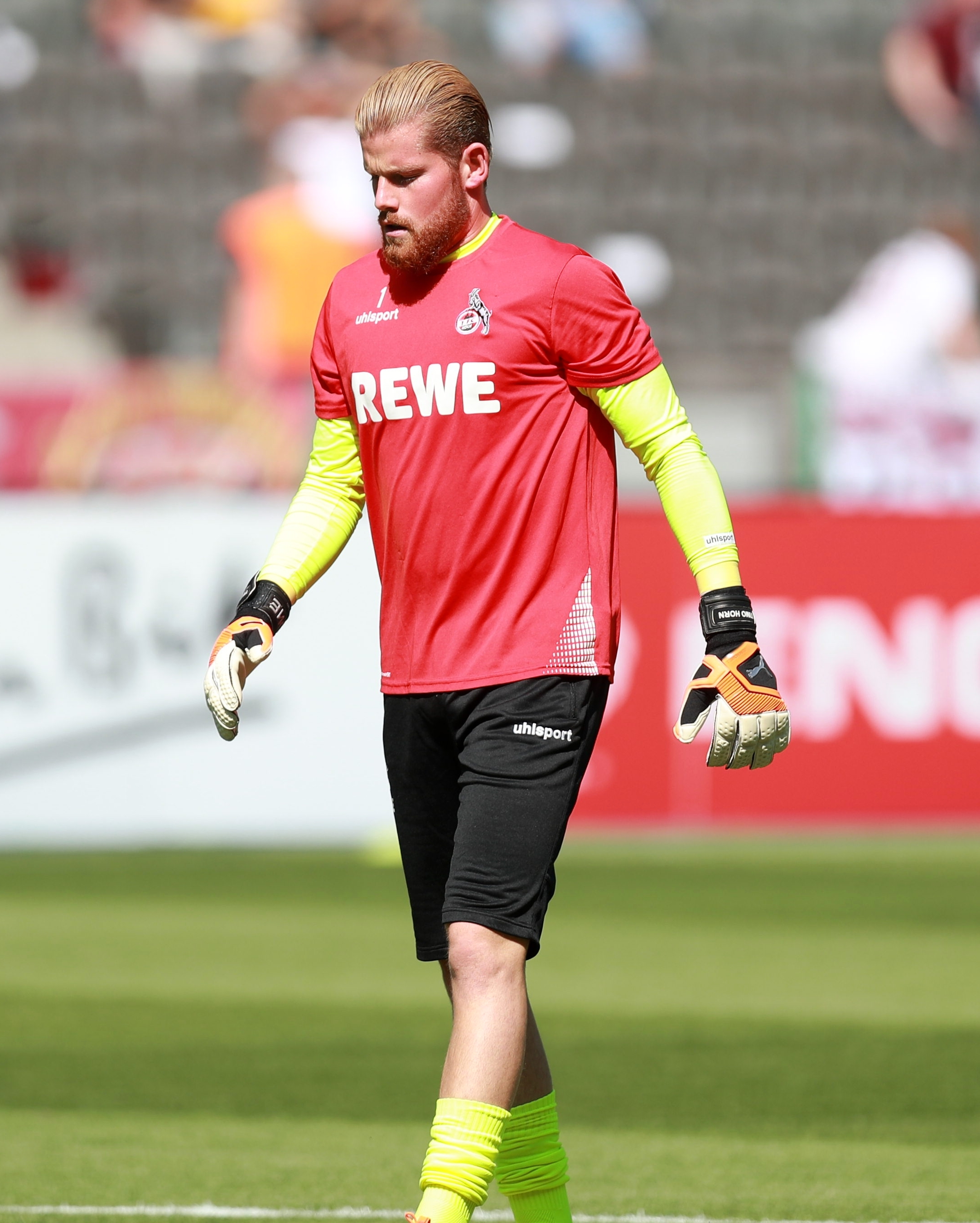 DFB-Pokal 2018/19, 1. Hauptrunde: BFC Dynamo gegen 1. FC Köln 1:9 (1:4)